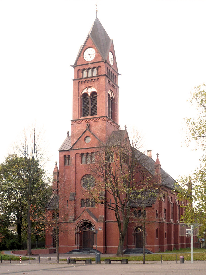 Evangelische Kirche am Markt in Essen-Katernberg, genannt: Bergmannsdom